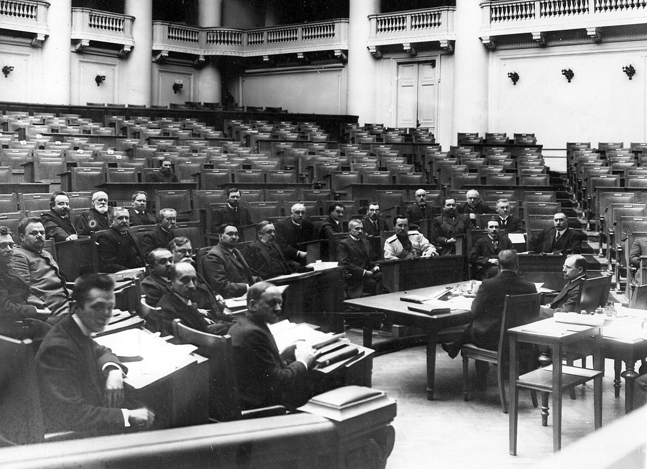 Заседание одной из думских комиссий в Четвертой Государственной думе ; сидит первый слева в первом ряду А.Ф.Керенский